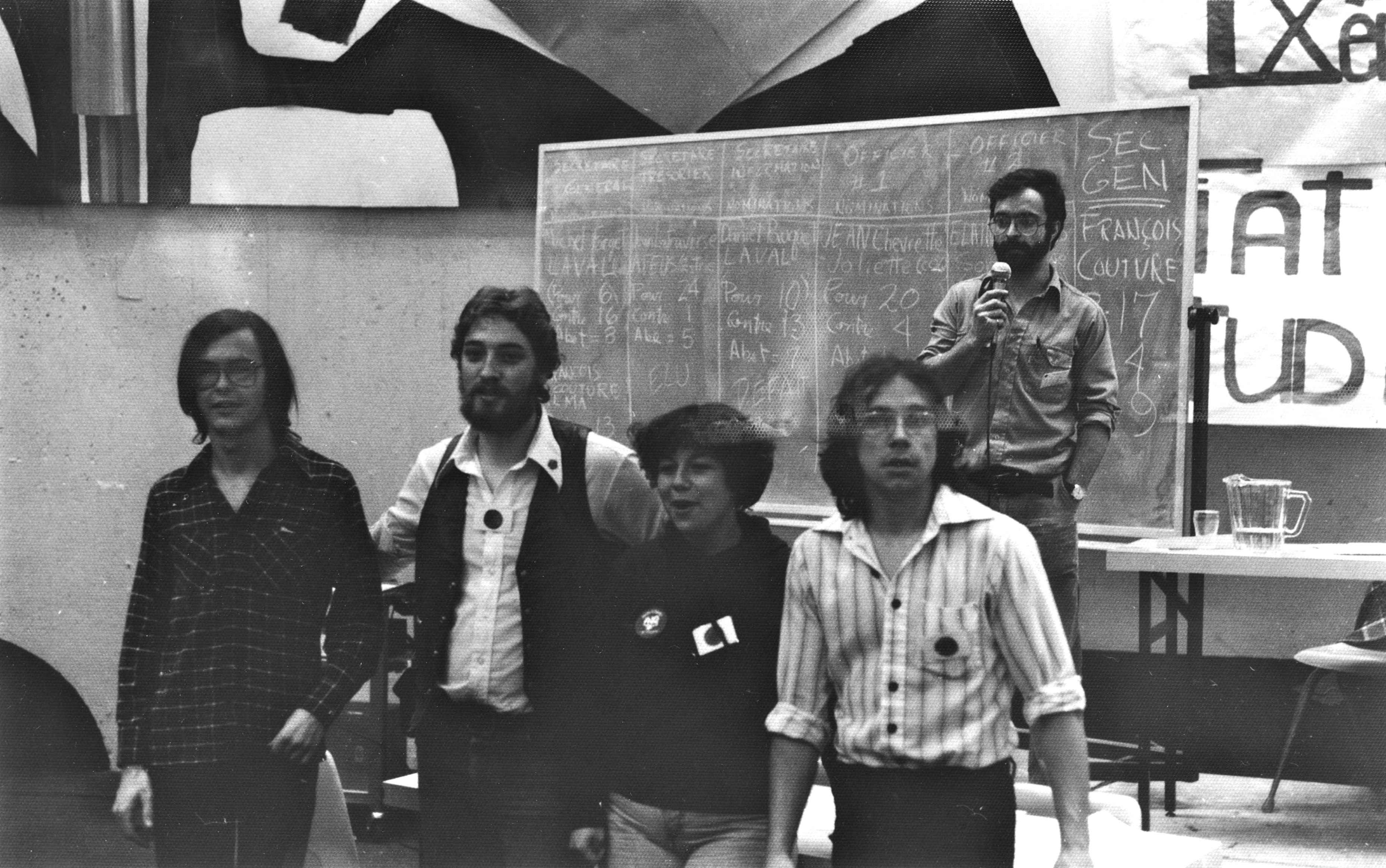 Membres élus au conseil exécutif de l'Association nationale des étudiants du Québec (ANEQ) lors du 9è congrès national de l'ANEQ, le 16 avril 1978 au CEGEP de Jonquière. De gauche à droite : François Couture (secrétaire général), Jean Chevrette (officier spécial), Élaine Zakaïb (officier spécial), Jean Latraverse (secrétaire trésorier). À l'arrière, le président d'assemblée.